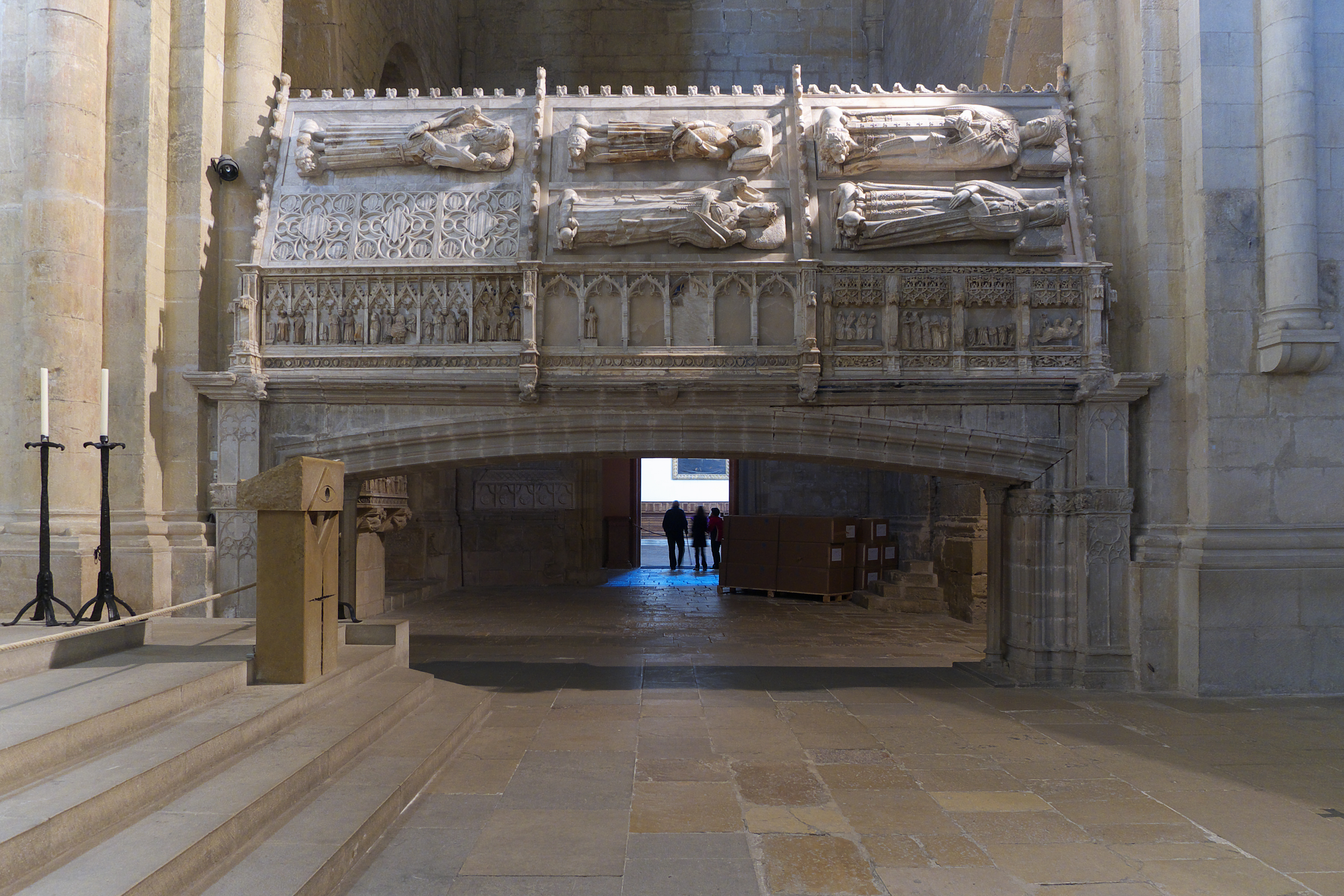 Iglesia del monasterio, parte de la Epístola. Sepulcros reconstruídos por Federico Marés Deulovol en 1944.